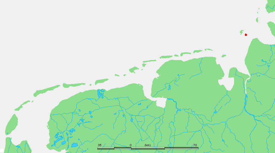 Wadden - Neuwerk.PNG